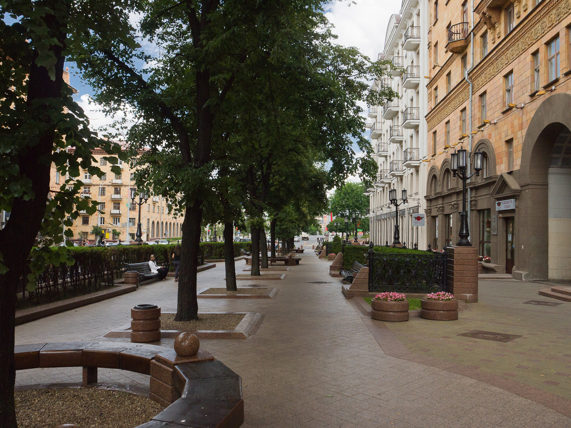 Бульвар па вул. Леніна